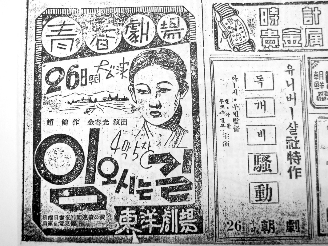 東洋劇場の演劇、朝鮮劇場での『凸凹お化け騒動』(도깨비騒動)の新聞広告、1948年12月26日付